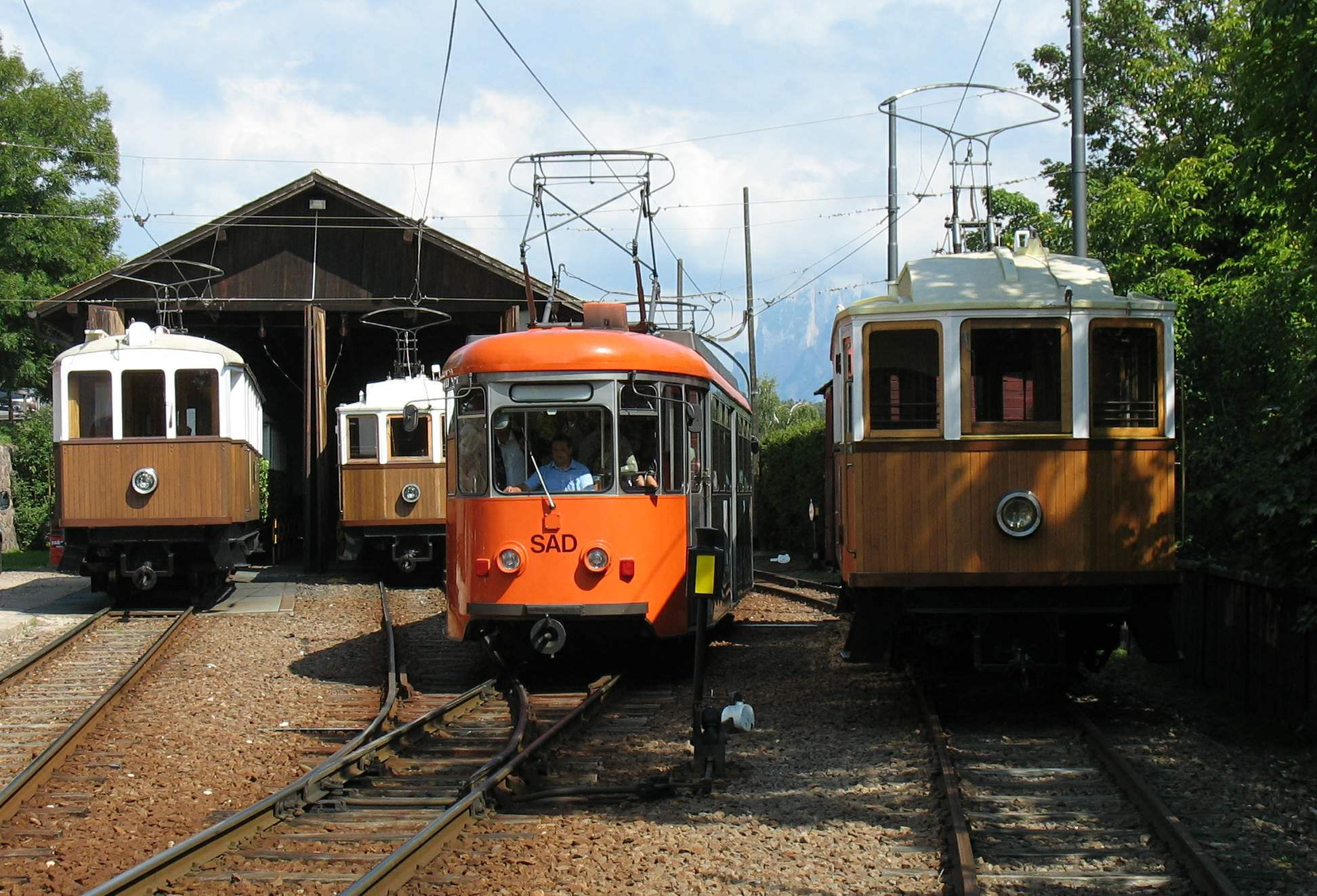 Fahrzeugparade im Bahnhof Oberbozen